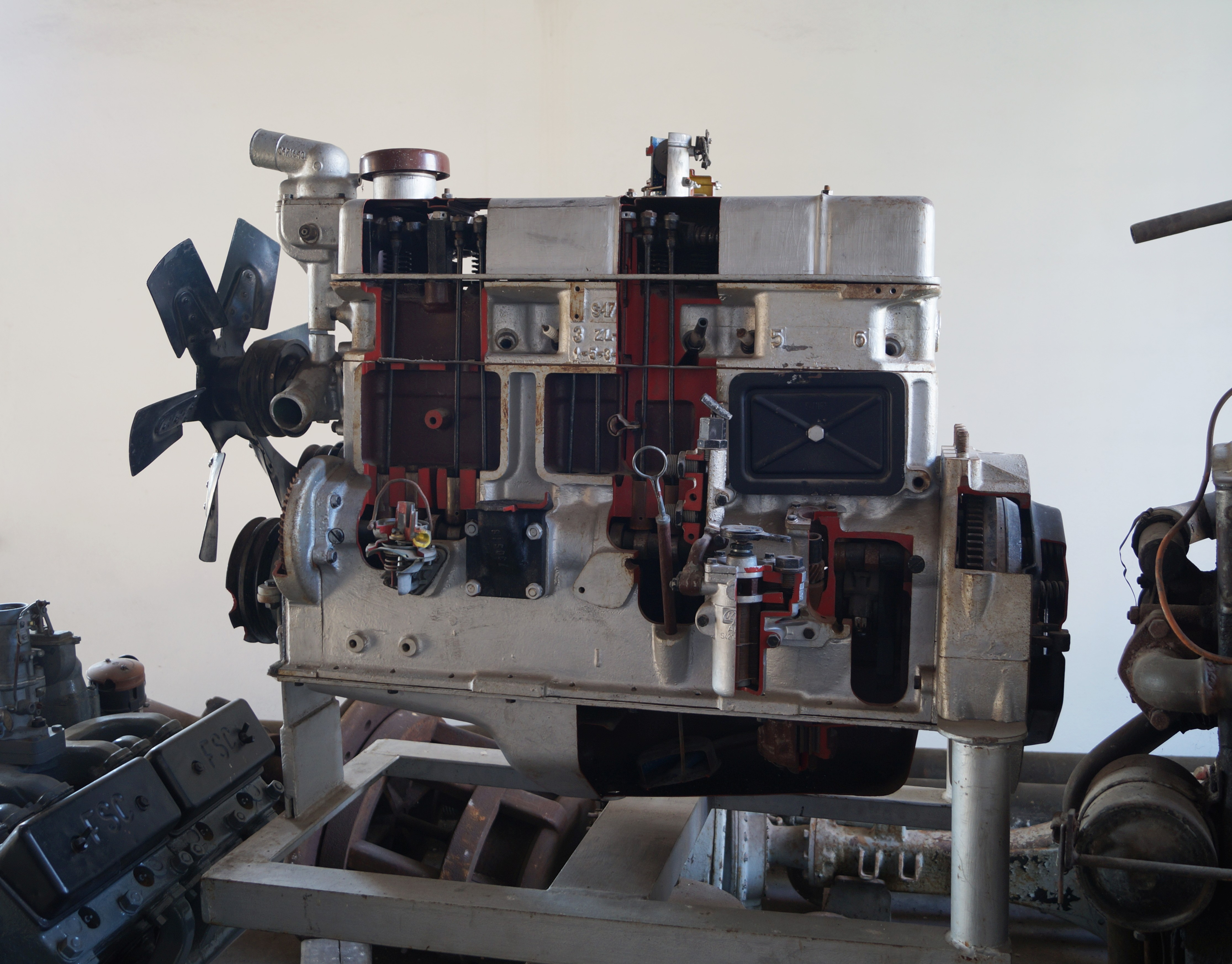 This photo was taken during Automotive Wikiexpedition 2016 set up by Wikimedia Polska Association. You can see all photographs in category Wikiekspedycja motoryzacyjna 2016. English | Polski | +/− Przekrój przez silnik Star na terenie Zakładu Wielkopiecowego Huty Żelaza w Starachowicach (obecnie Muzeum Przyrody i Techniki w Starachowicach)